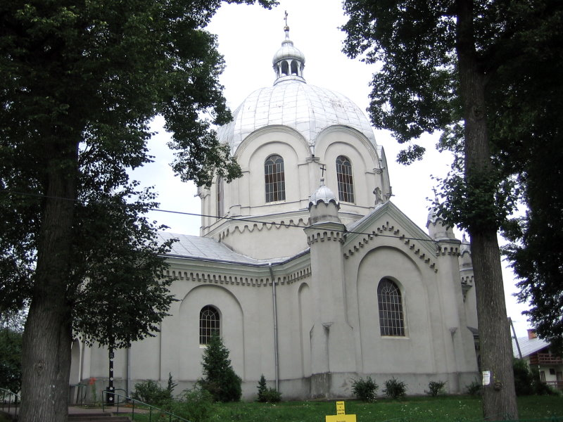 Ryszkowa Wola (Poland), Greek Catholic church